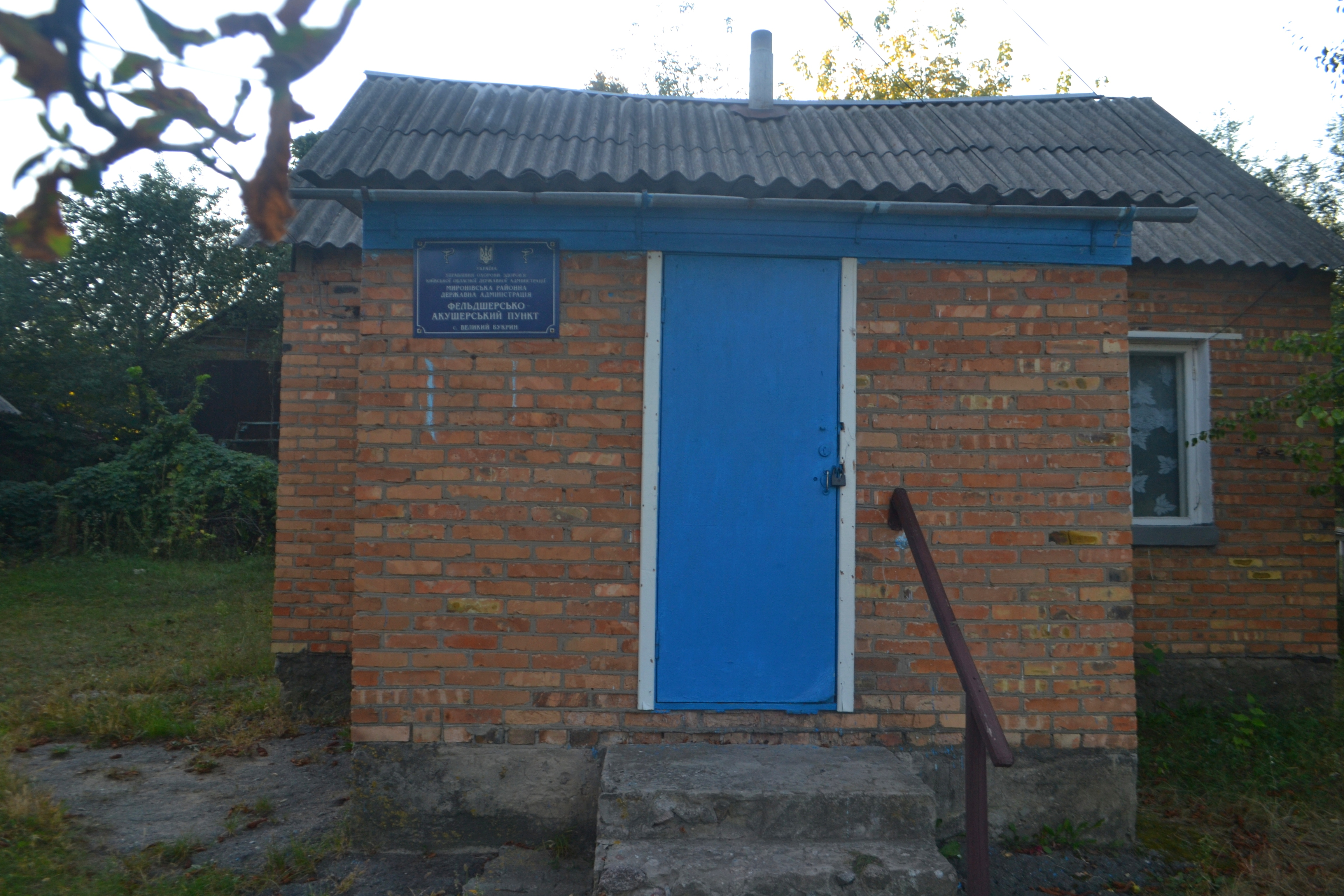 Фельдшерсько-акушерський пункт (ФАП) у с.Великий Букрин. фото 2